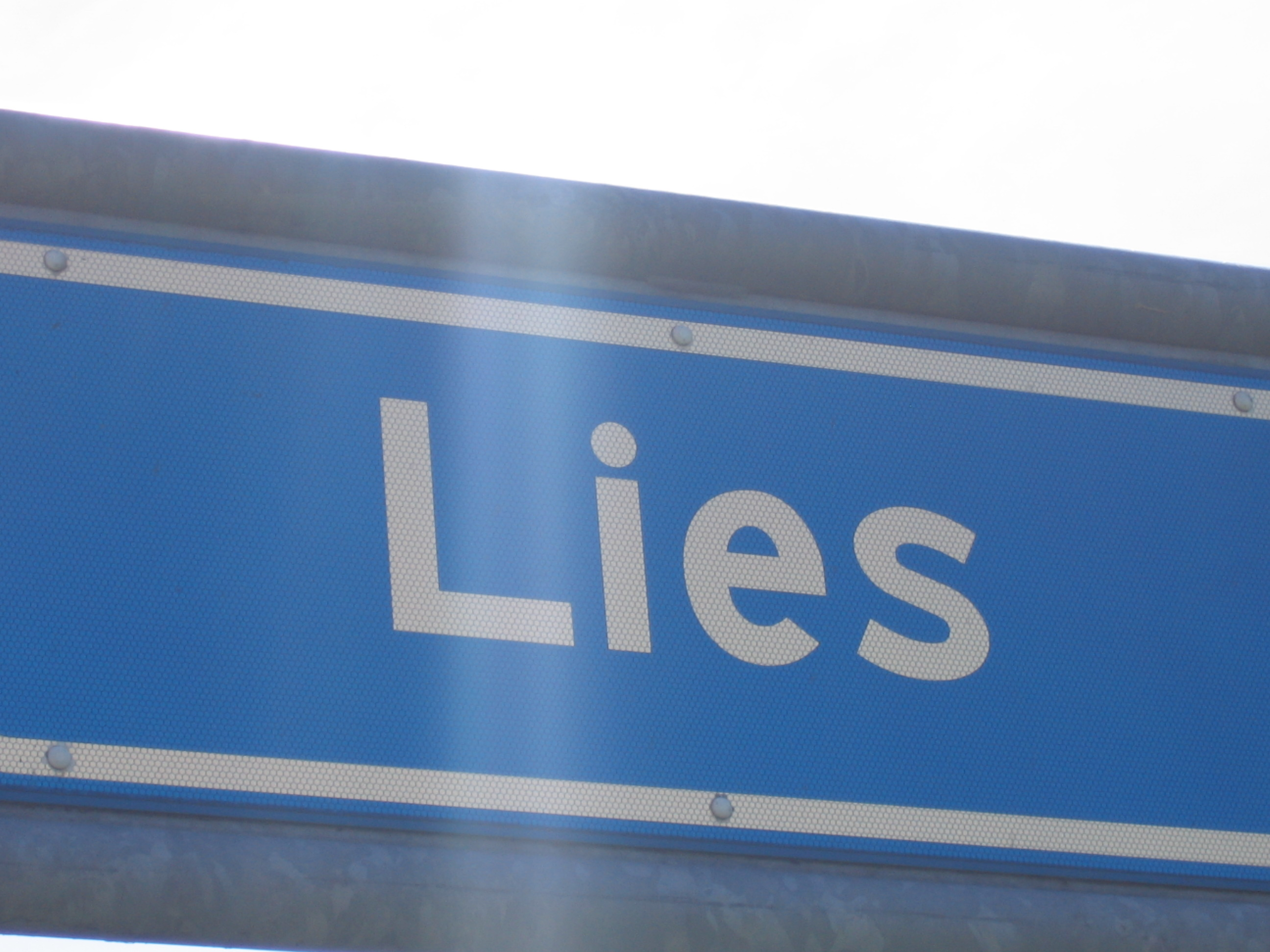 Lies Terschelling